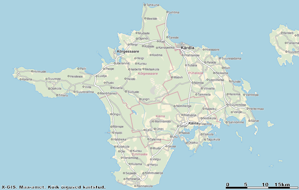 Hiiumaa kaart Maa-ameti geoportaalist